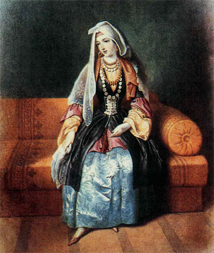 Казачка станицы Червленой. Акварель